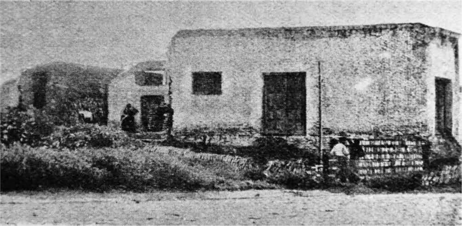 Fotografía de las ruinas del antiguo Caserío de los Negros tomada a fines de 1902, cuando estas fueron derrumbadas definitivamente.